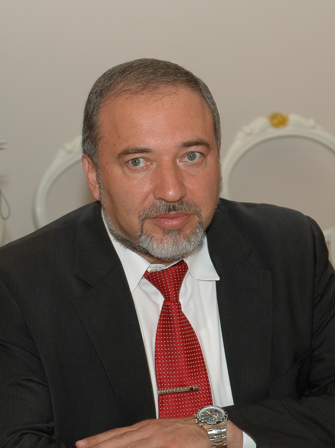 2010. gada 5. jūlijs. Saeimas priekšsēdētāja biedre Karina Pētersone tiekas ar Izraēlas Valsts ārlietu ministru Avigdoru Libermanu (Avigdor Liberman). Foto: Saeimas Kanceleja